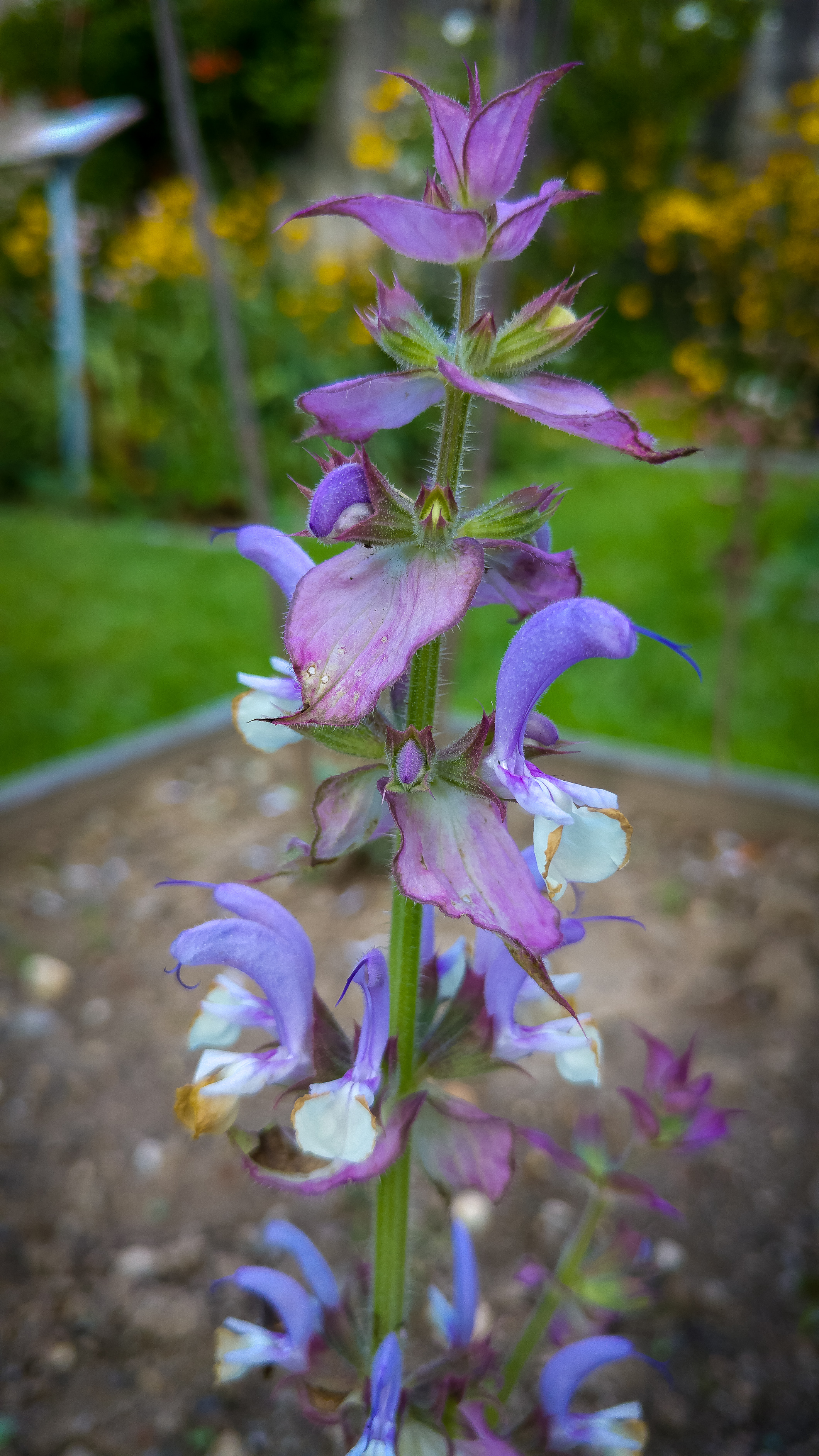 Der Muskatellersalbei (Salvia sclarea), Muskat-Salbei